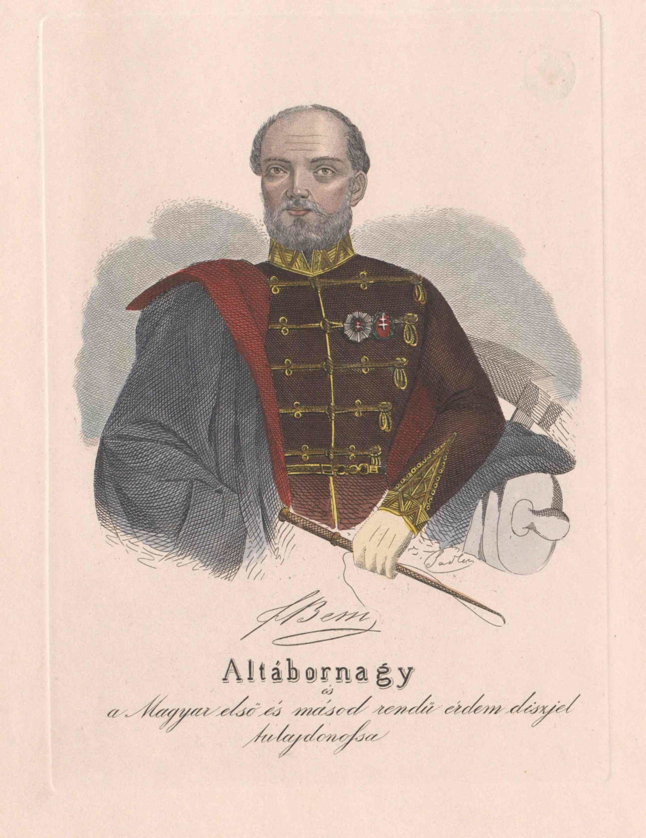 Bem József, a székelyek Bem apója (Tarnów, 1794. március 14. – Aleppó, 1850. december 10.) lengyel és magyar honvéd altábornagy.